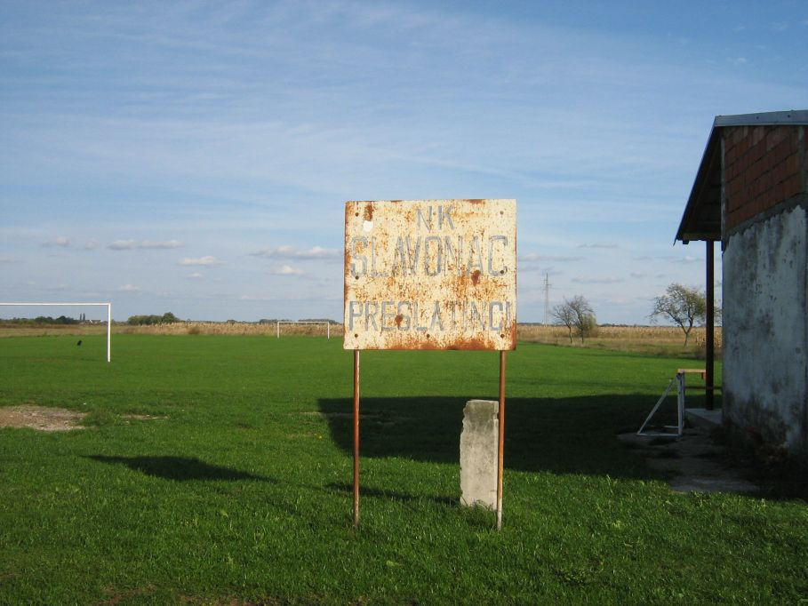 Igralište Preslatinci